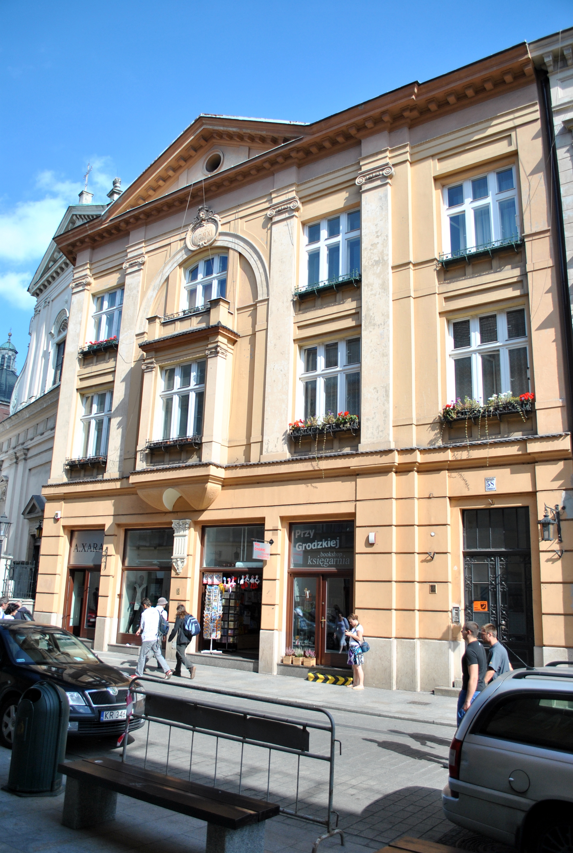 Kamienica przy ulicy Grodzkiej 58 w Krakowie.